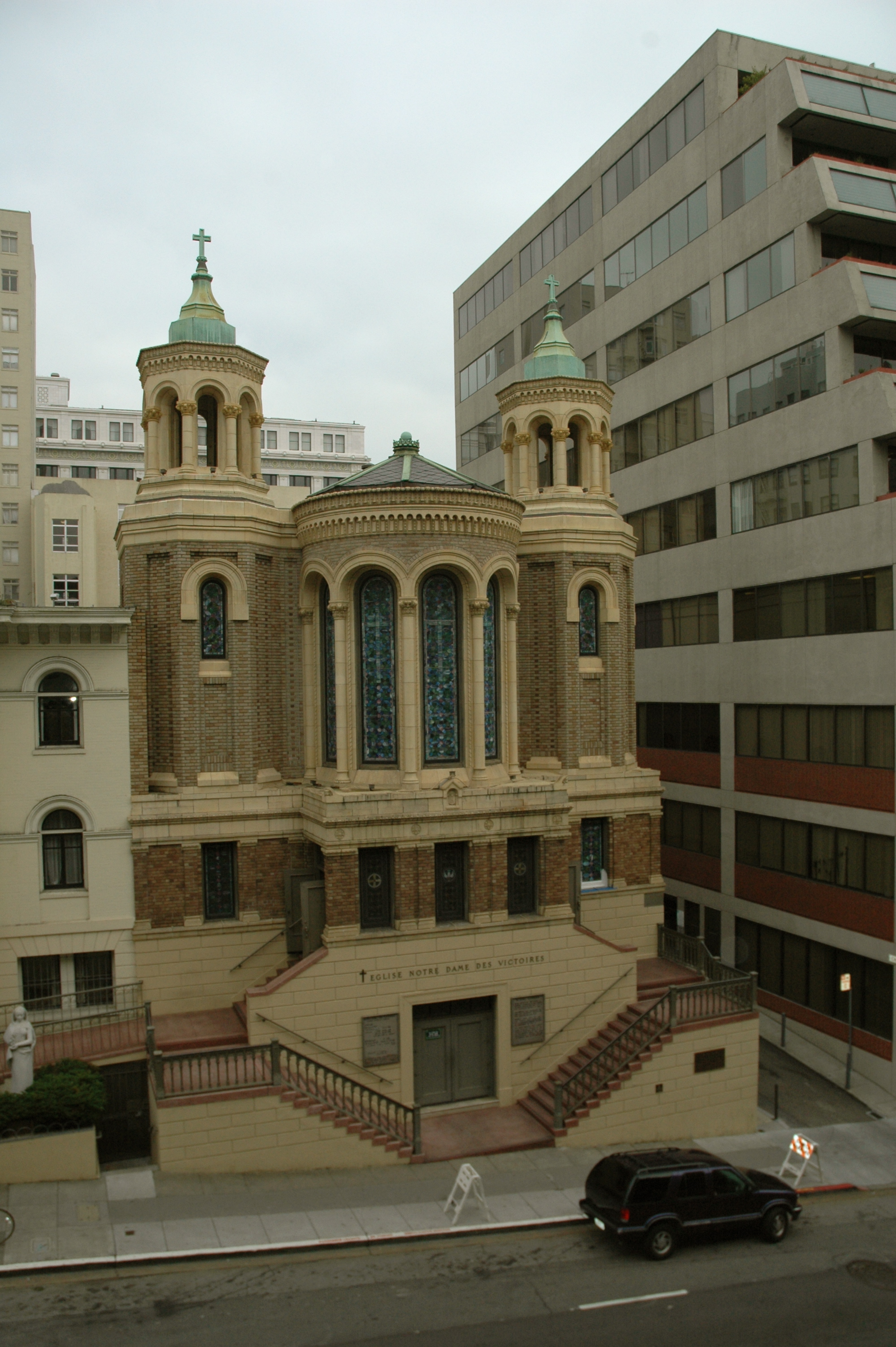 L'Église Notre-Dame-des-Victoires sur Bush Street, à San Francisco. On devine à droite l'immeuble hébergeant notamment le Consulat de France. Photo : Arnaud Hubert